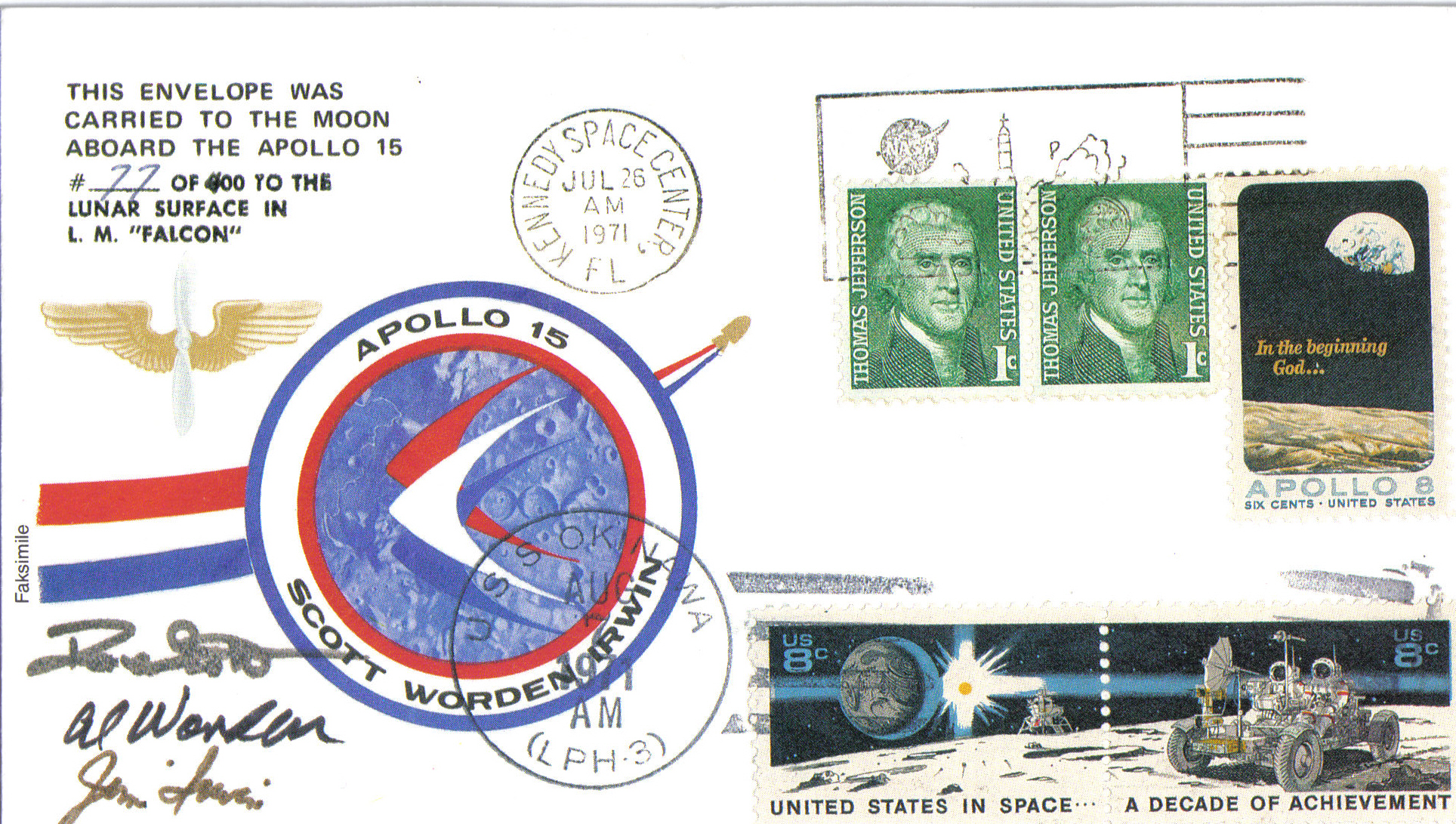 Faksimile eines Briefes, der 1971 von den Astronauten Scott, Worden und Irwin zum Mond und zurück befördert wurde.